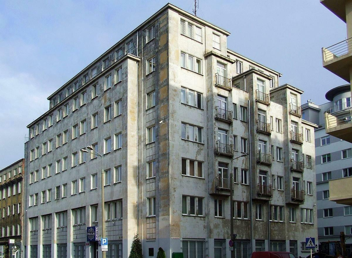 Komisariat Policji, na rogu Portowej i Św. Wojciecha.